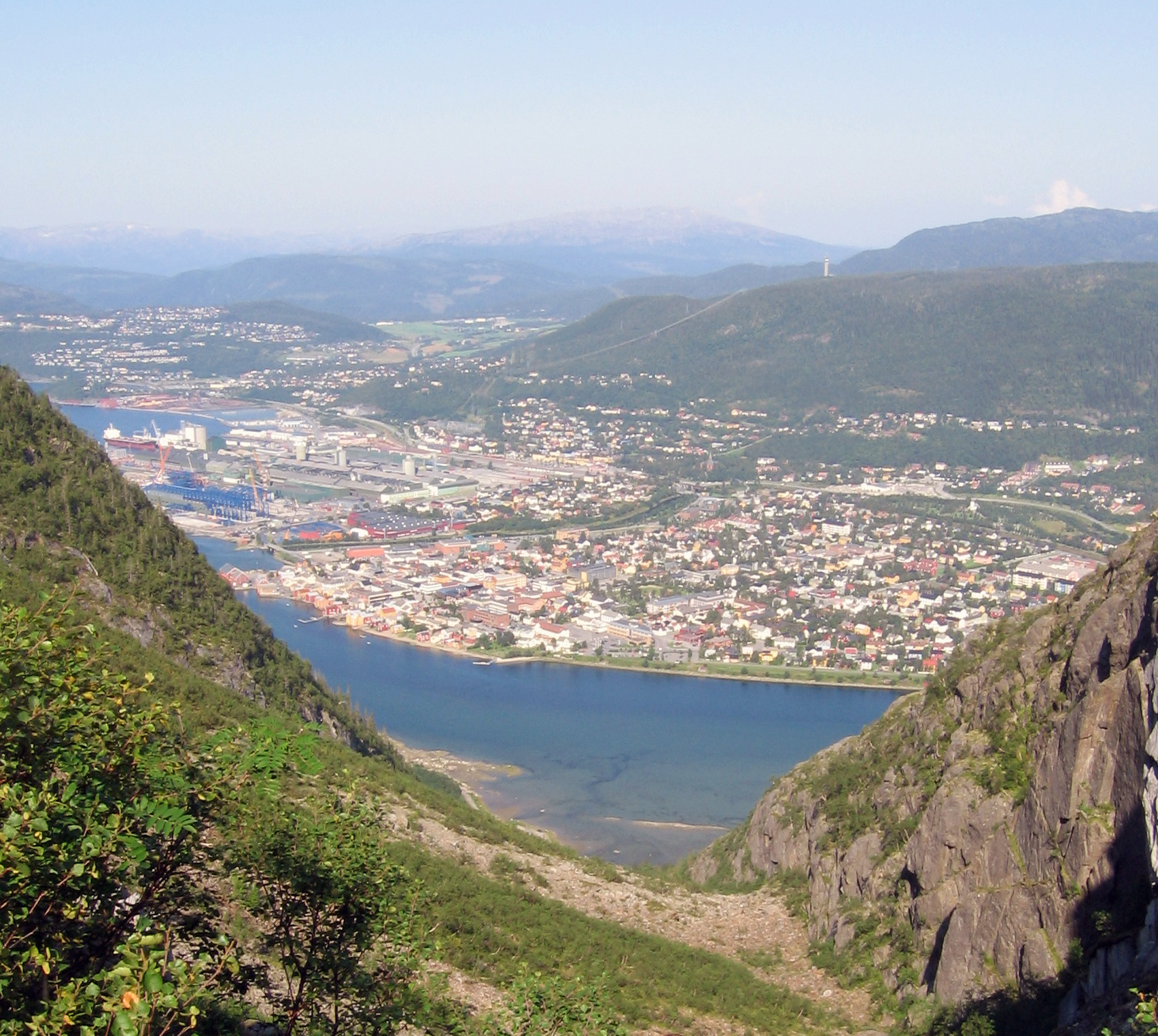 Utsikt over Mosjøen sentrum sett fra Trongskardet